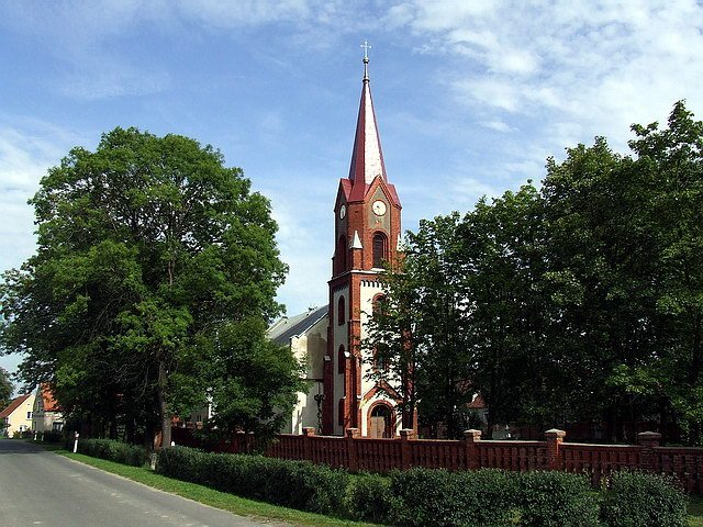 Raszowa - kościół p.w. Niepokalanego Poczęcia Najświętszej Marii Panny (zabytek nr rejestr. 46/A)